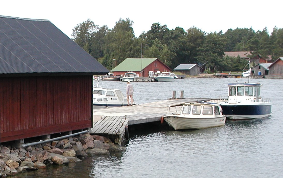 Högsåra bryggan.